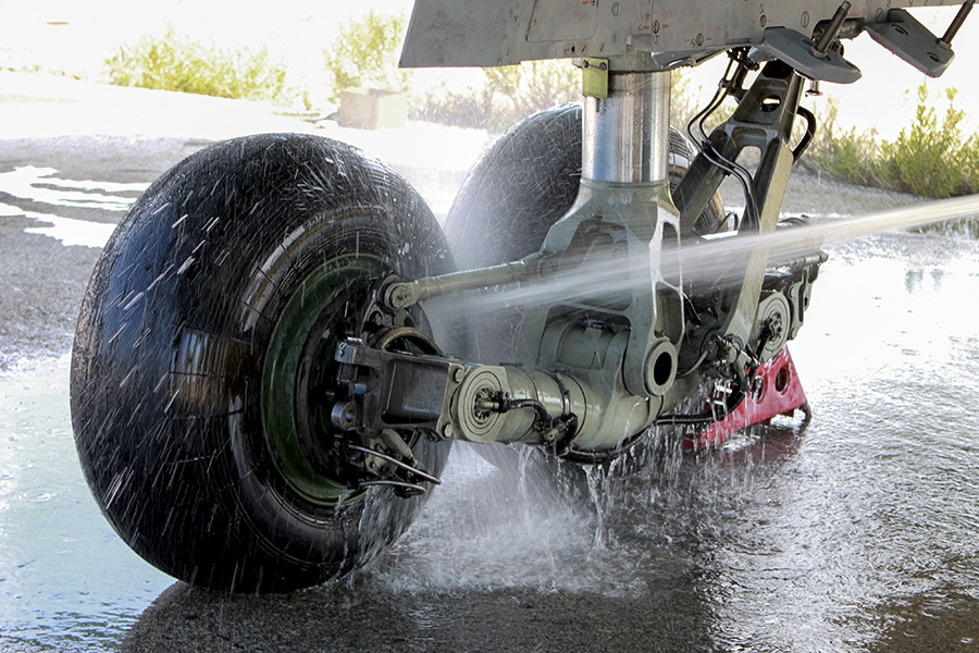 Полеты российской авиации с аэродрома Хмеймим (Сирийская Республика)